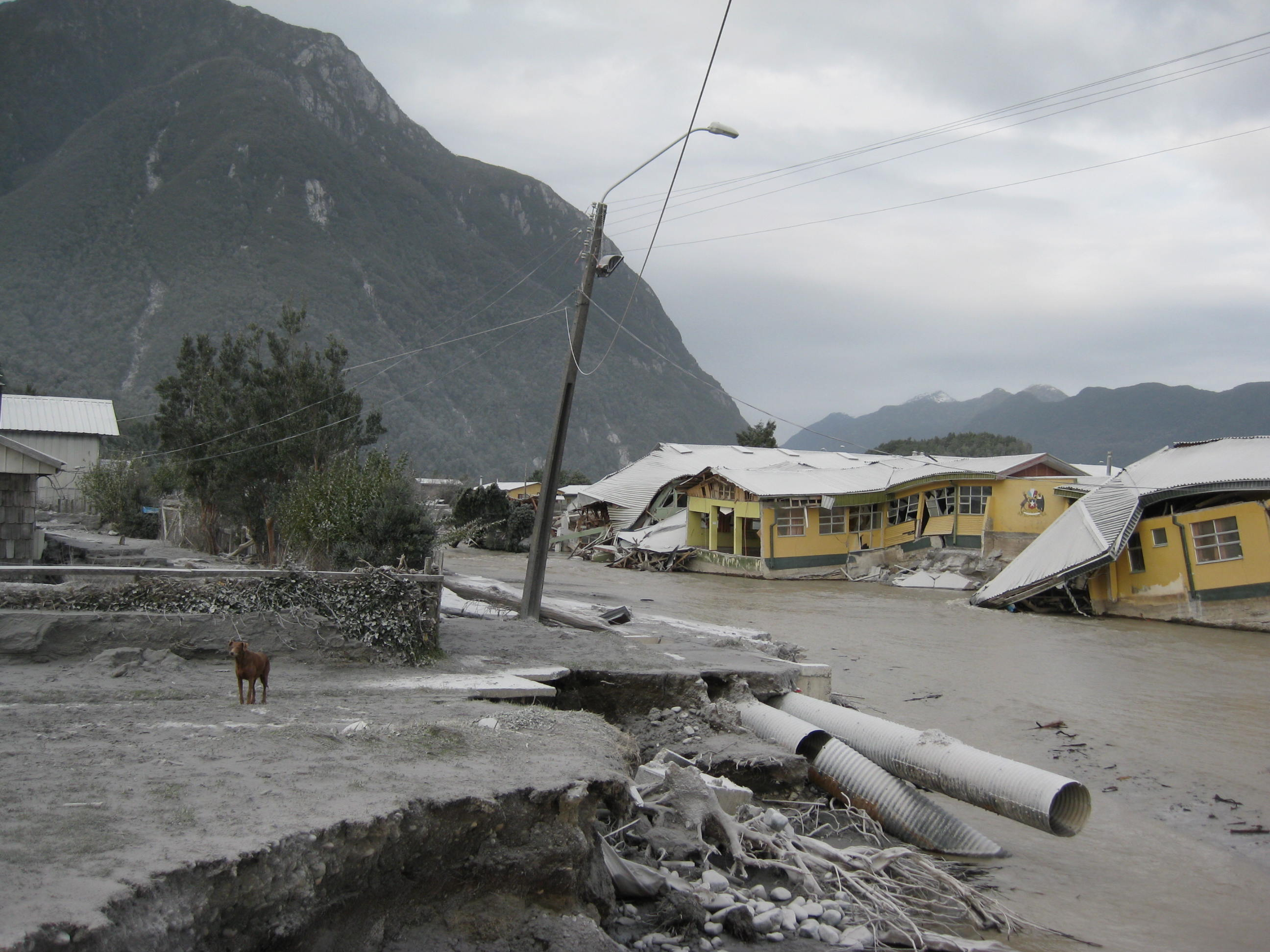 Escuela de Chaitén. Fotografía: "Cortesía de mi Viejo Carlitos"